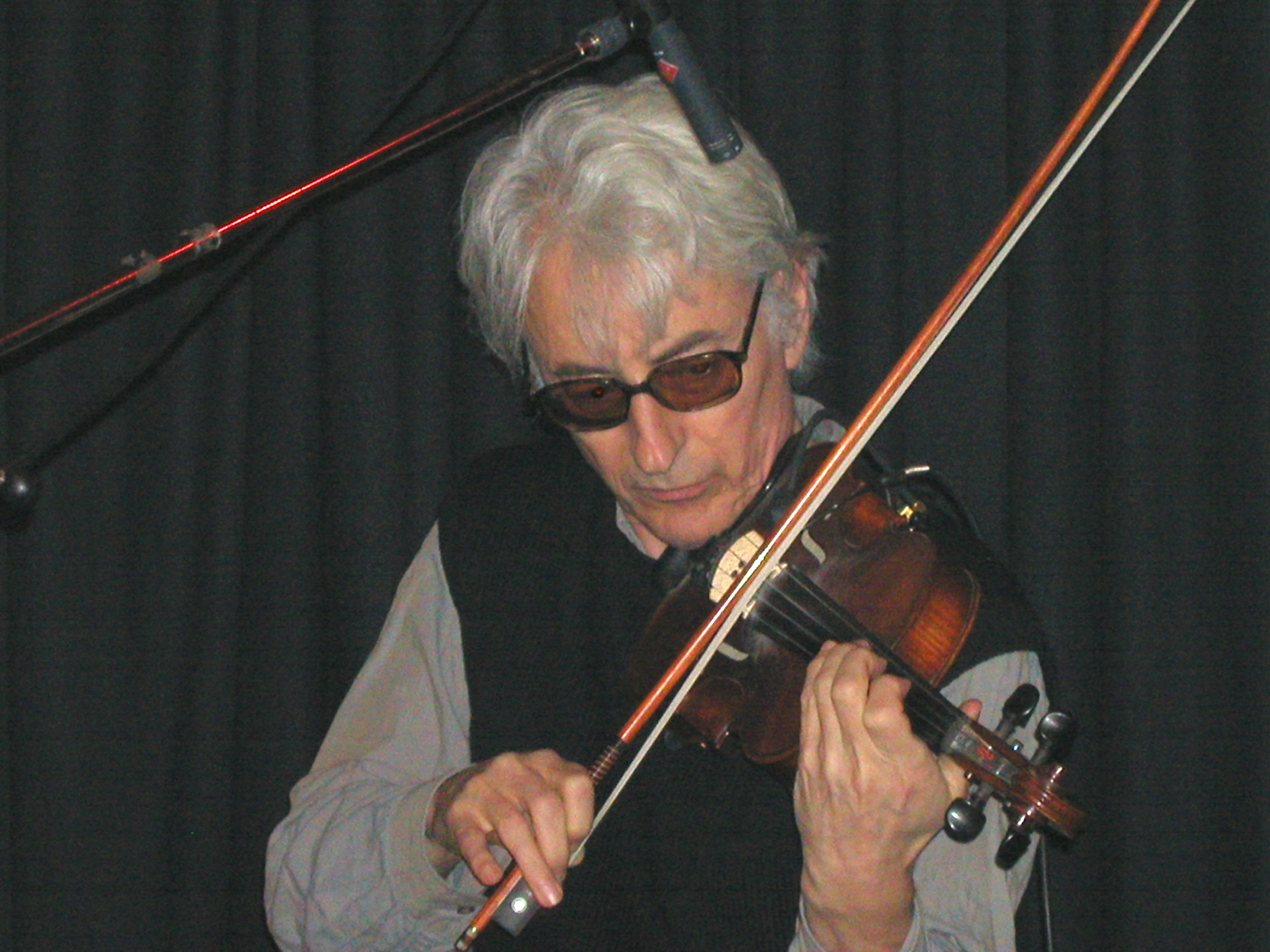 Der australische Geiger Jon Rose beim Konzert nit Futch im Club W71 in Weikersheim